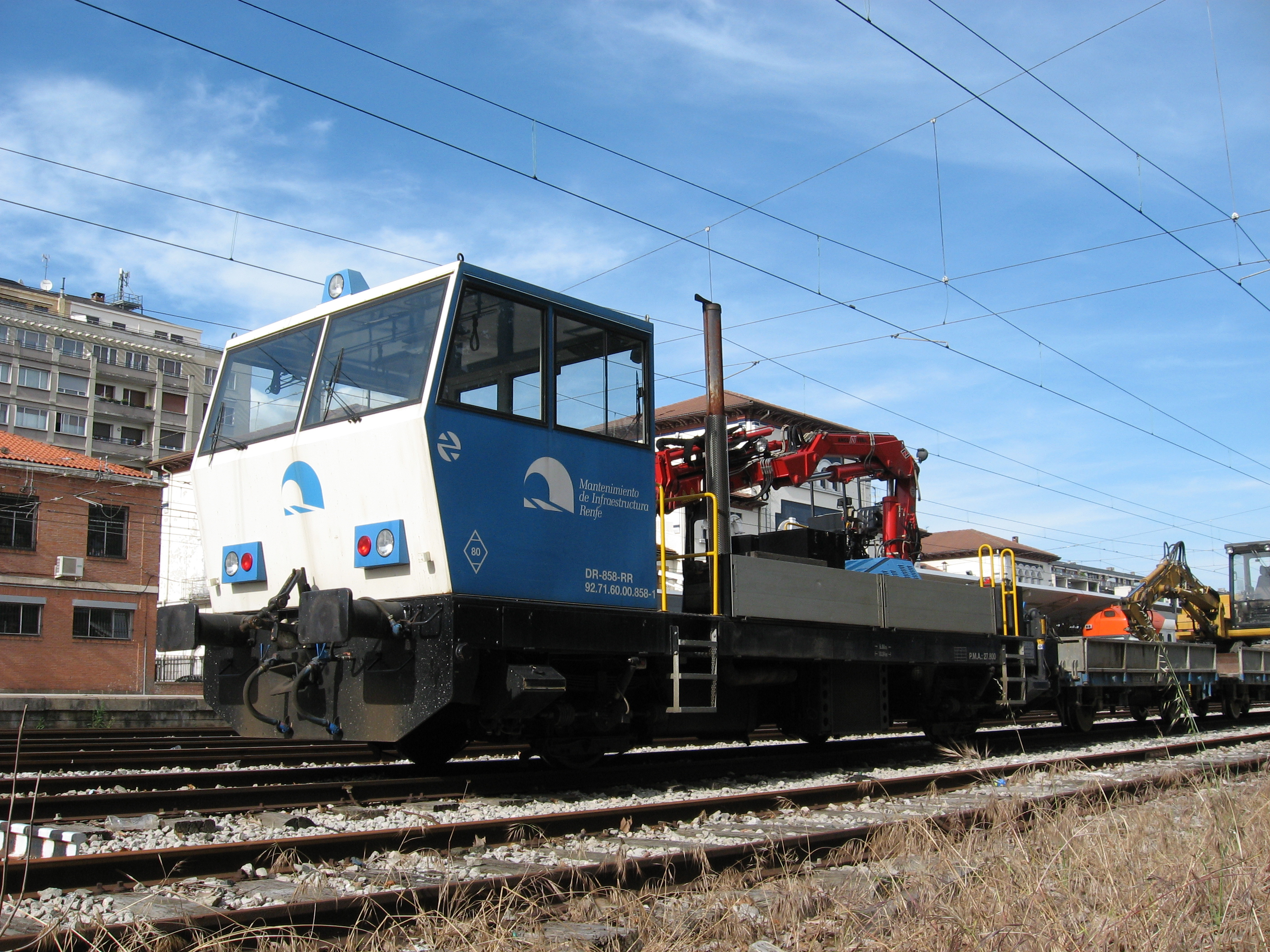 Desc: Dresina DR-858-RR en Vitoria